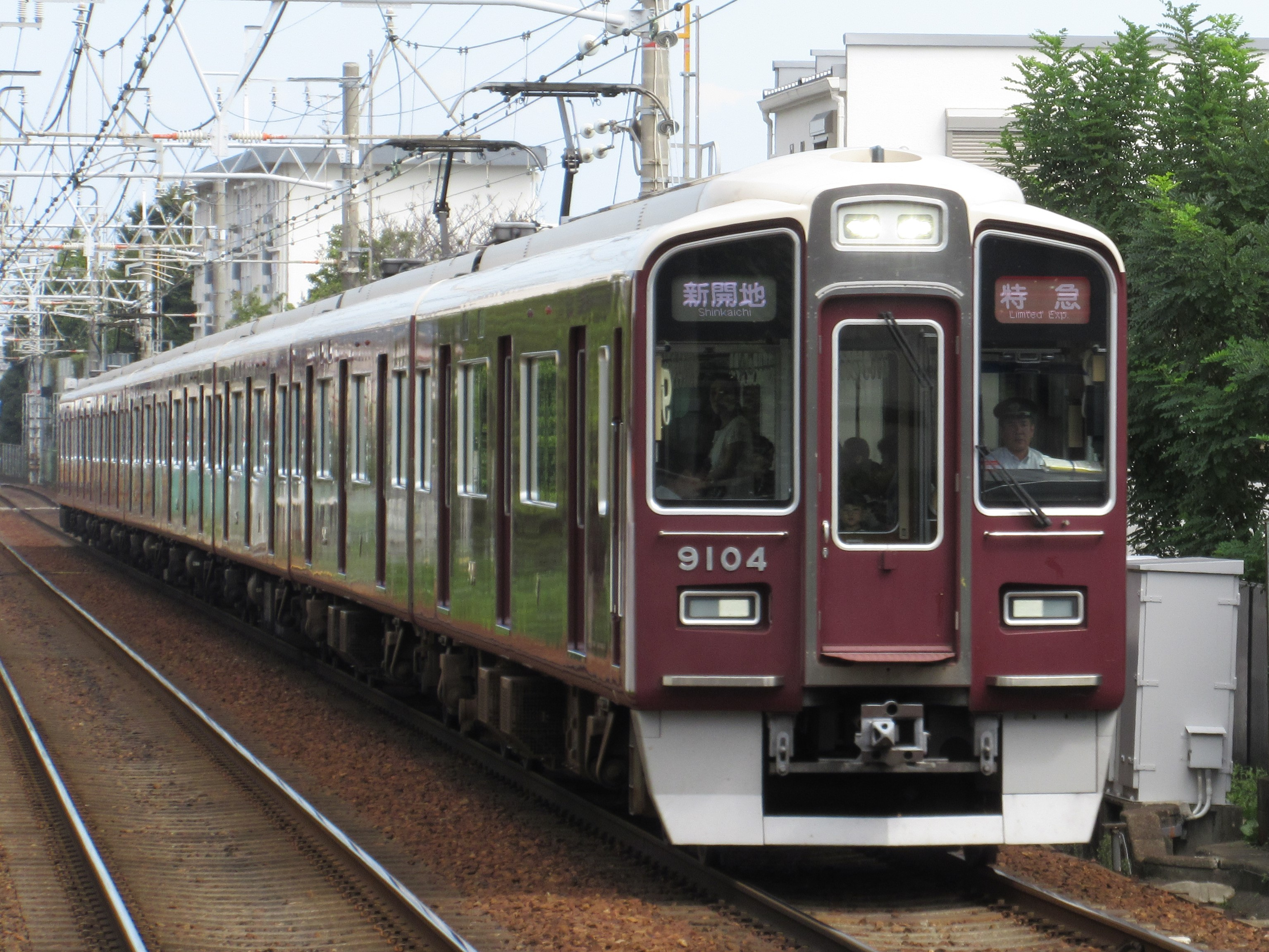 阪急電鉄9104 (岡本駅にて)